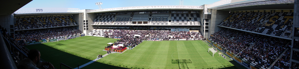 Foto panorãmica do estádio do Bessa (Boavista FC) durante a missa da benção das pastas da queima das fitas, do Porto, 2007 Tive que pedir a 30000 pessoas para ficar quietinhas enquanto tirava as fotos ;)